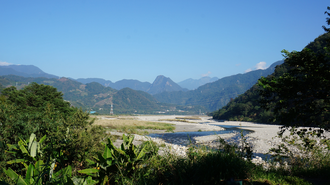 中文（台灣）: 大甲溪天冷段